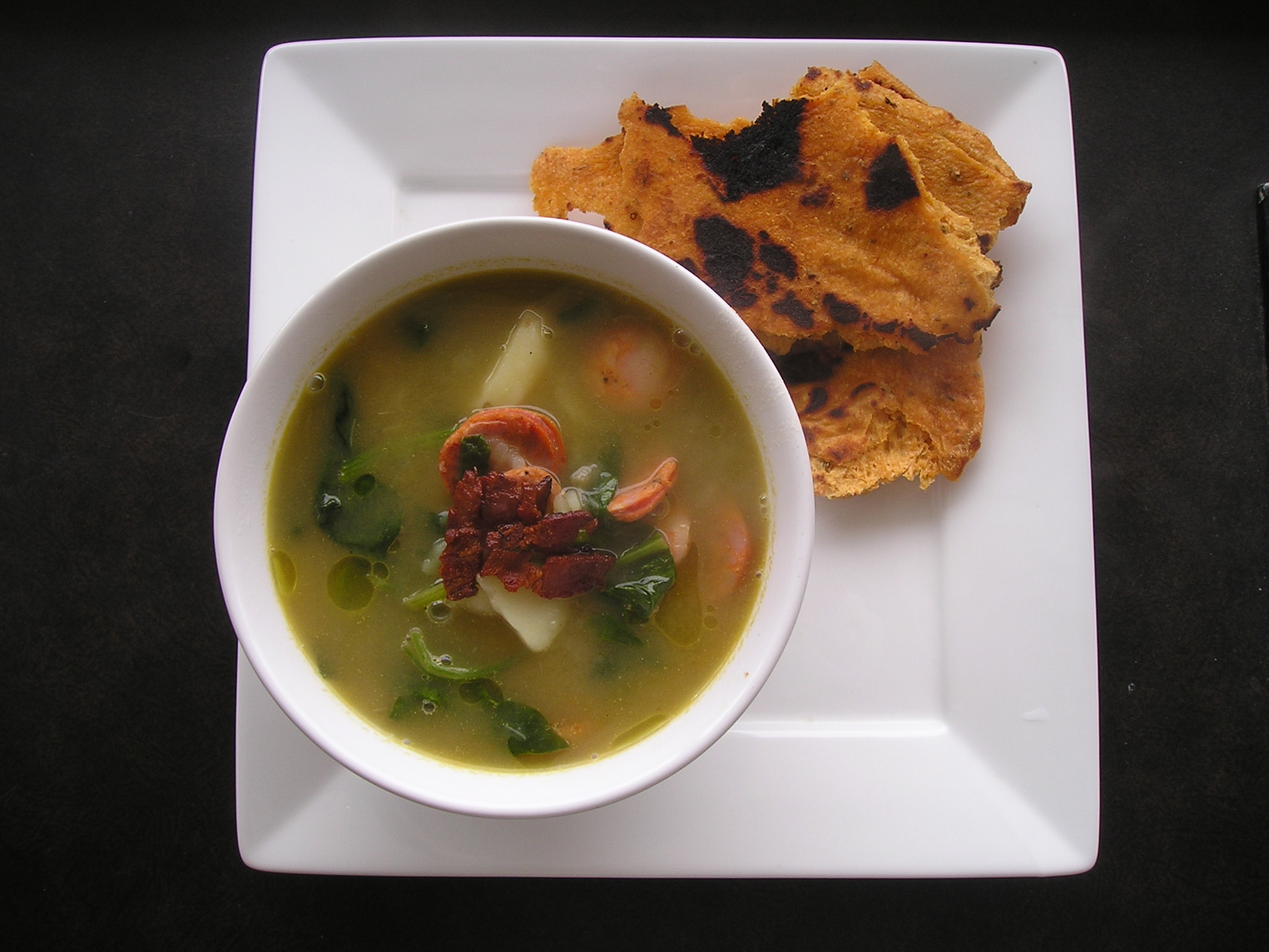 Blog post here.